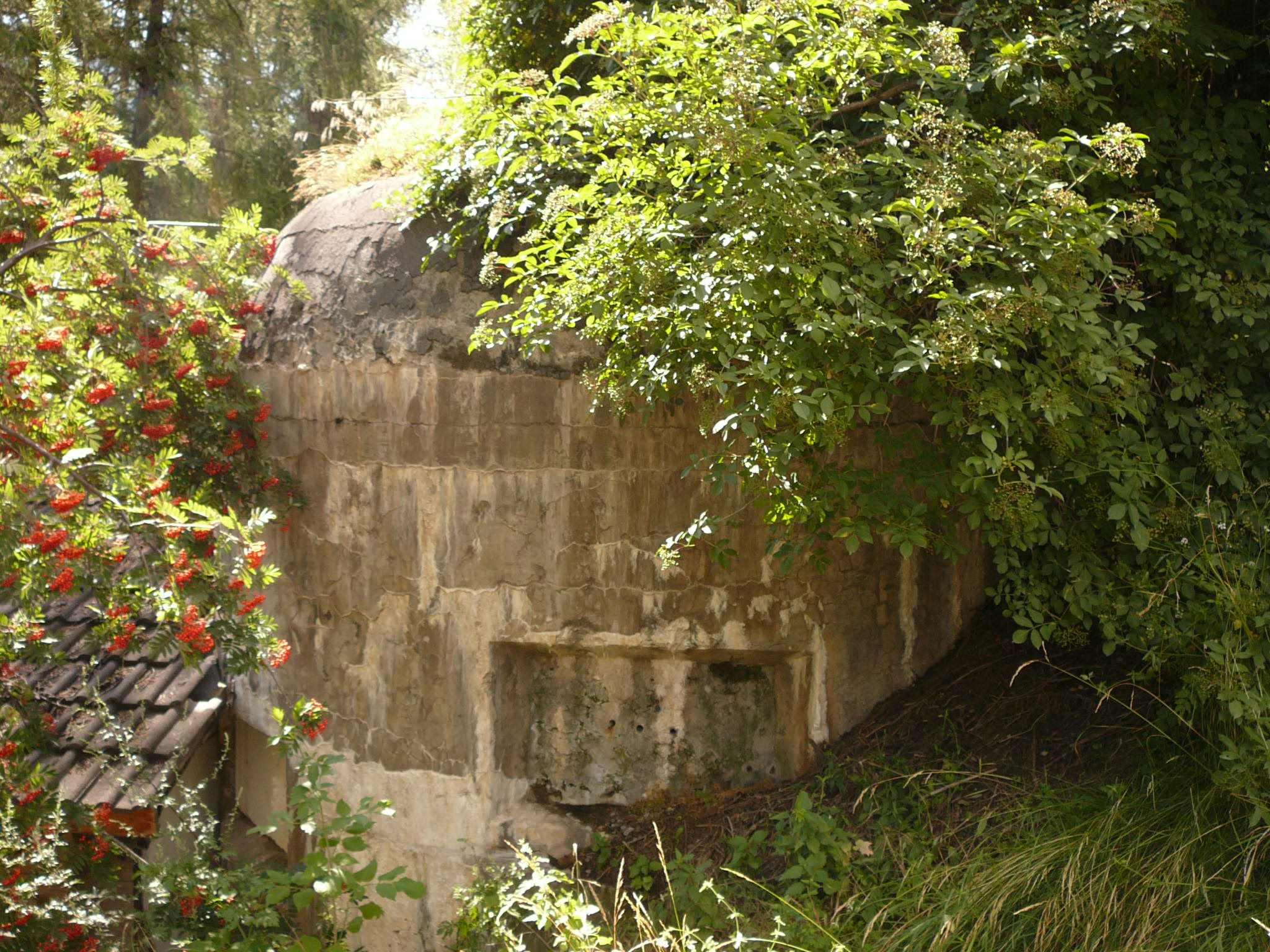 Opera 21, sbarramento di Malles